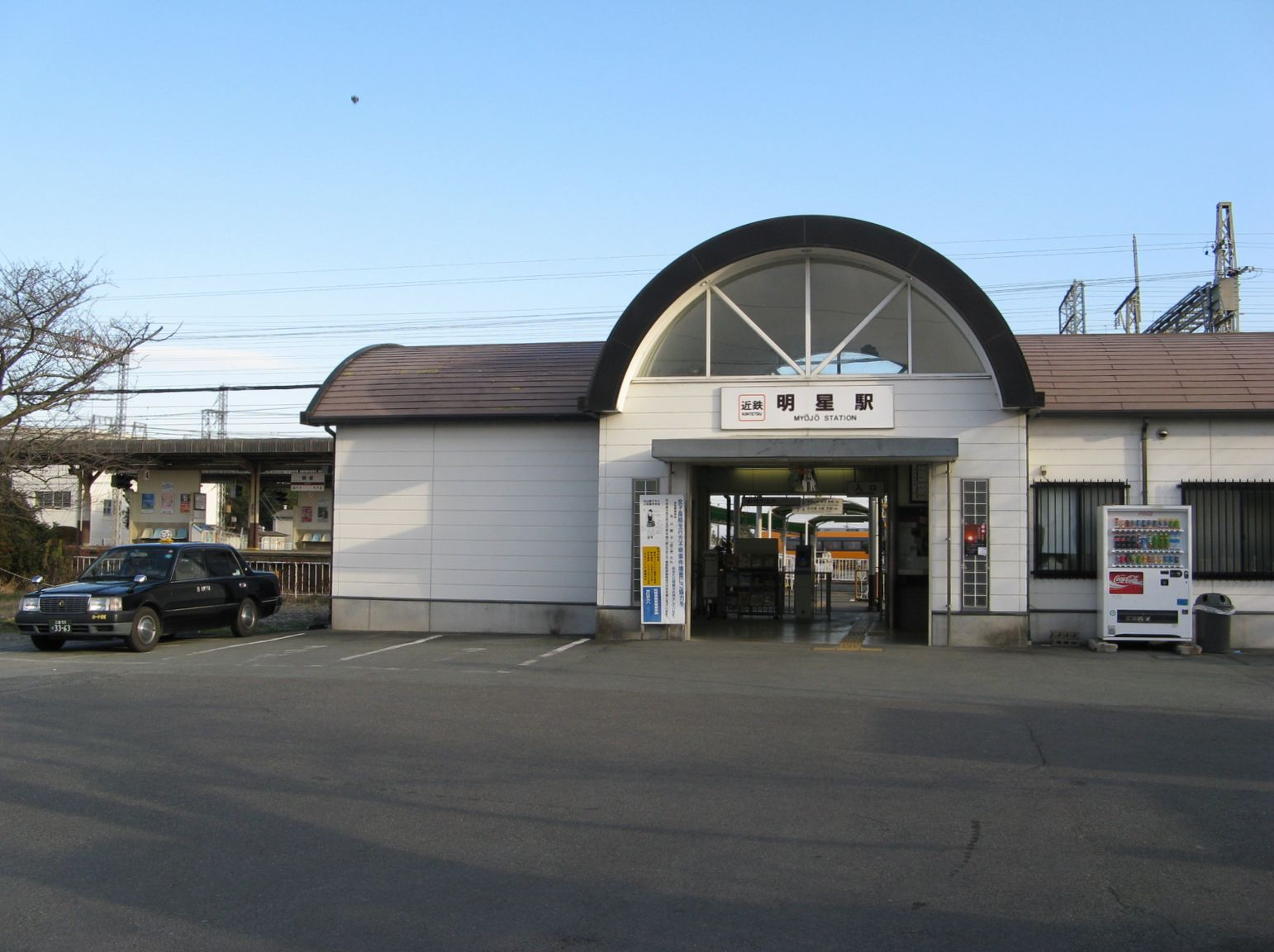 Myōjō Station, Meiwa, Mie, Japan